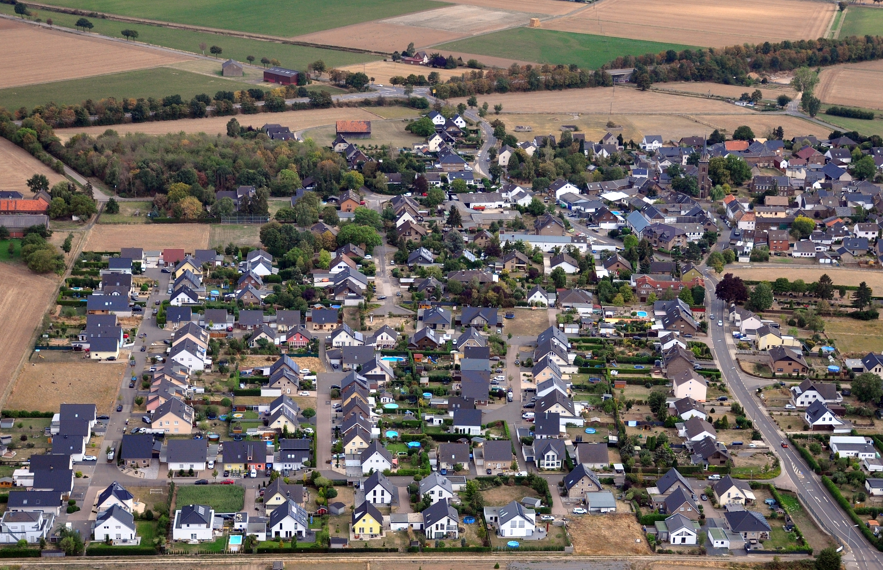 Euskirchen-Weidesheim – Neubaugebiet 2018